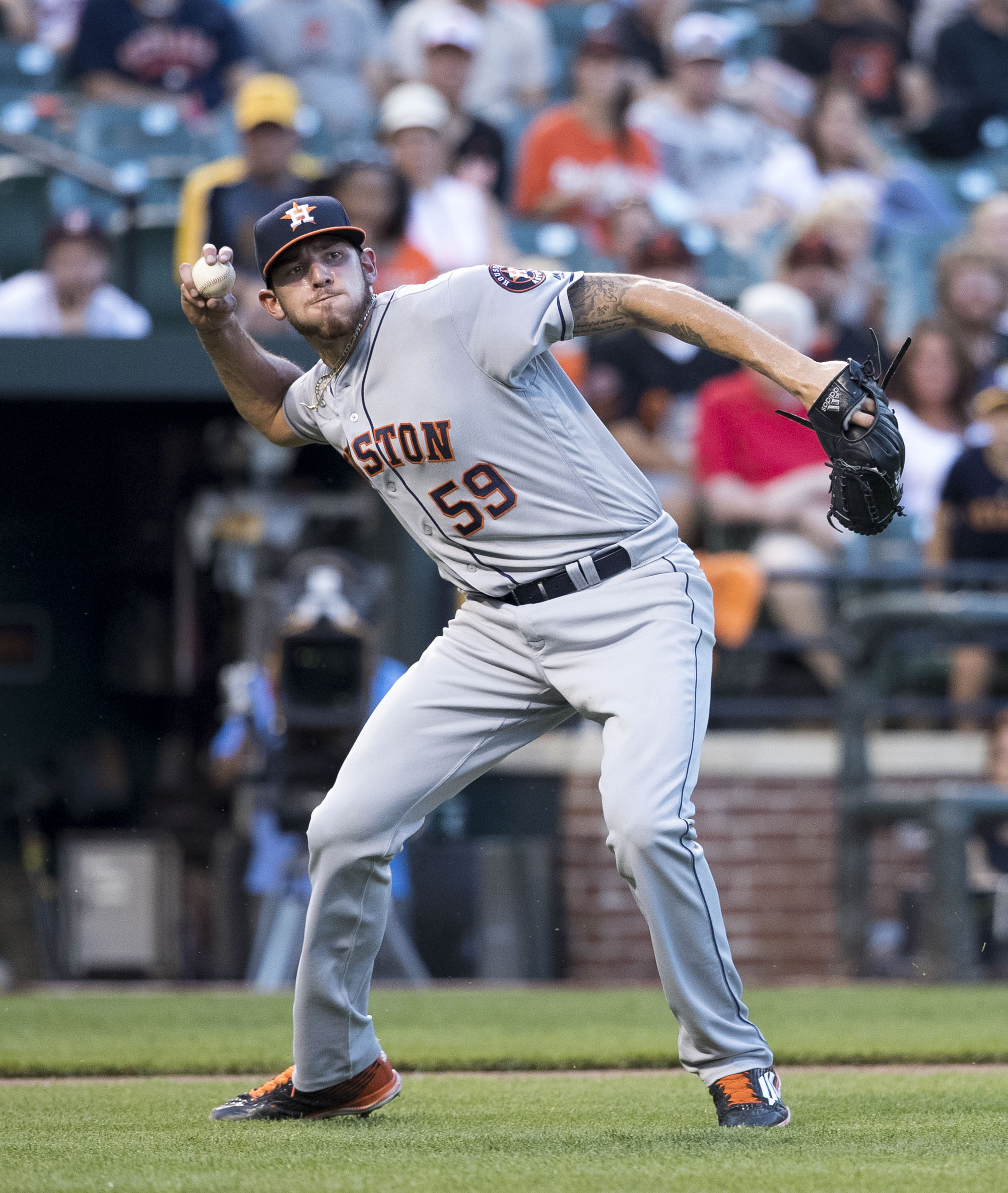 Joe Musgrove